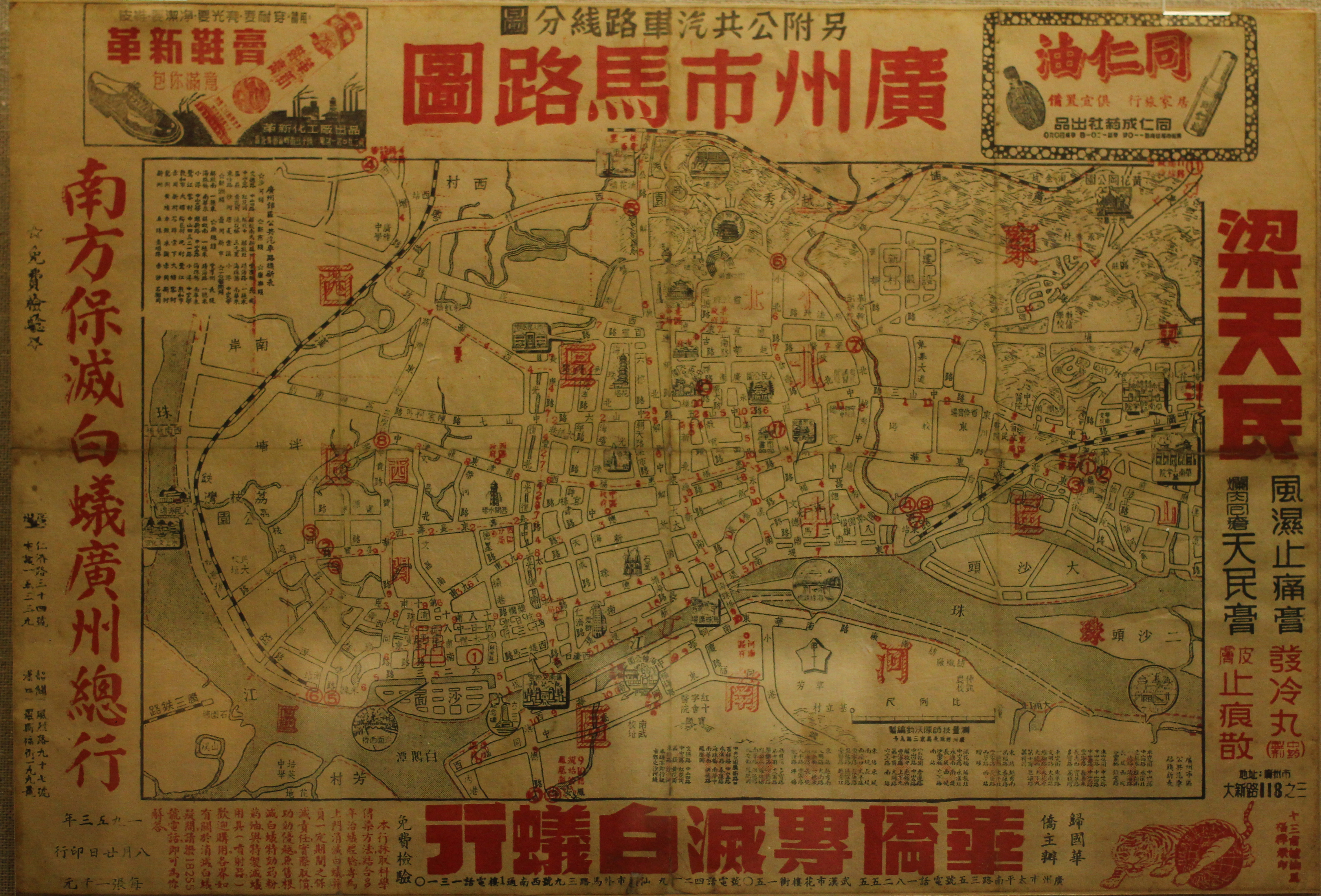 廣州市馬路圖。一九五三年八月二十日印。